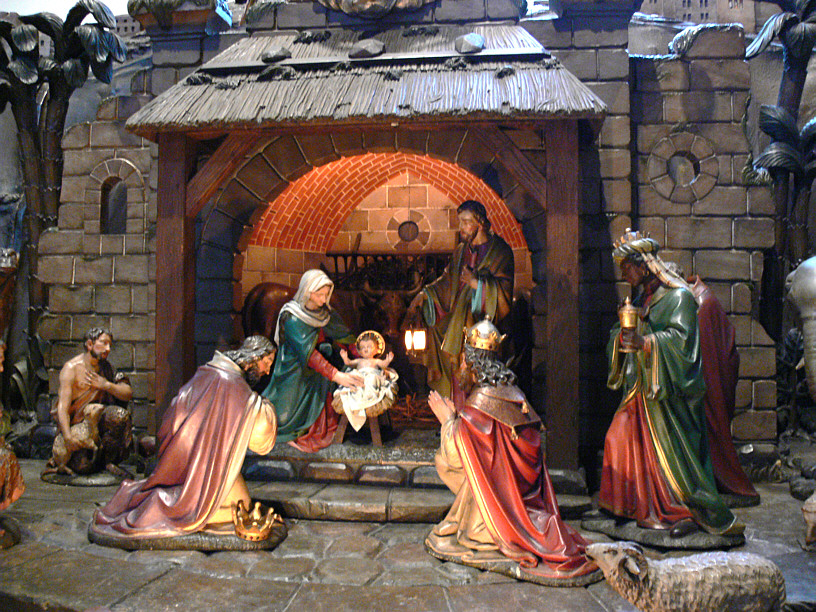 Liebfrauenkirche Ravensburg, Krippe von Moriz Schlachter, 1915